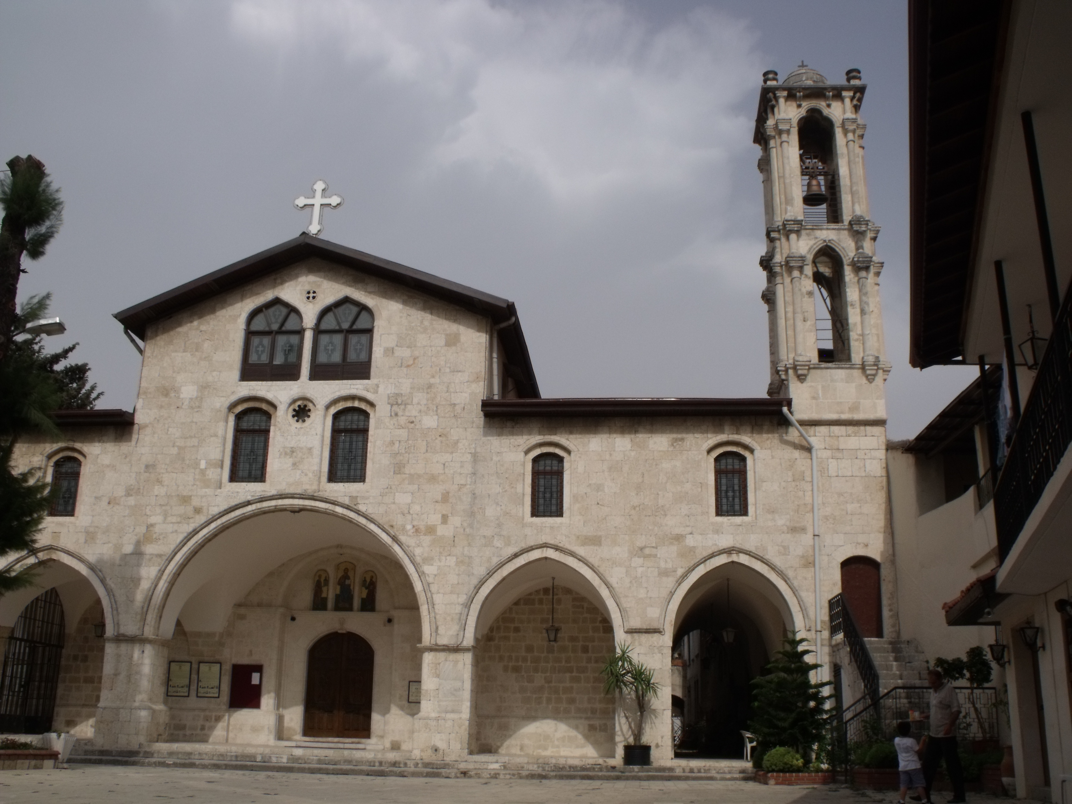 ANTAKYA EYLÜL 2011